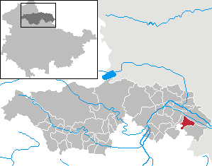 Donndorf in Thuringia - Kyffhäuserkreis